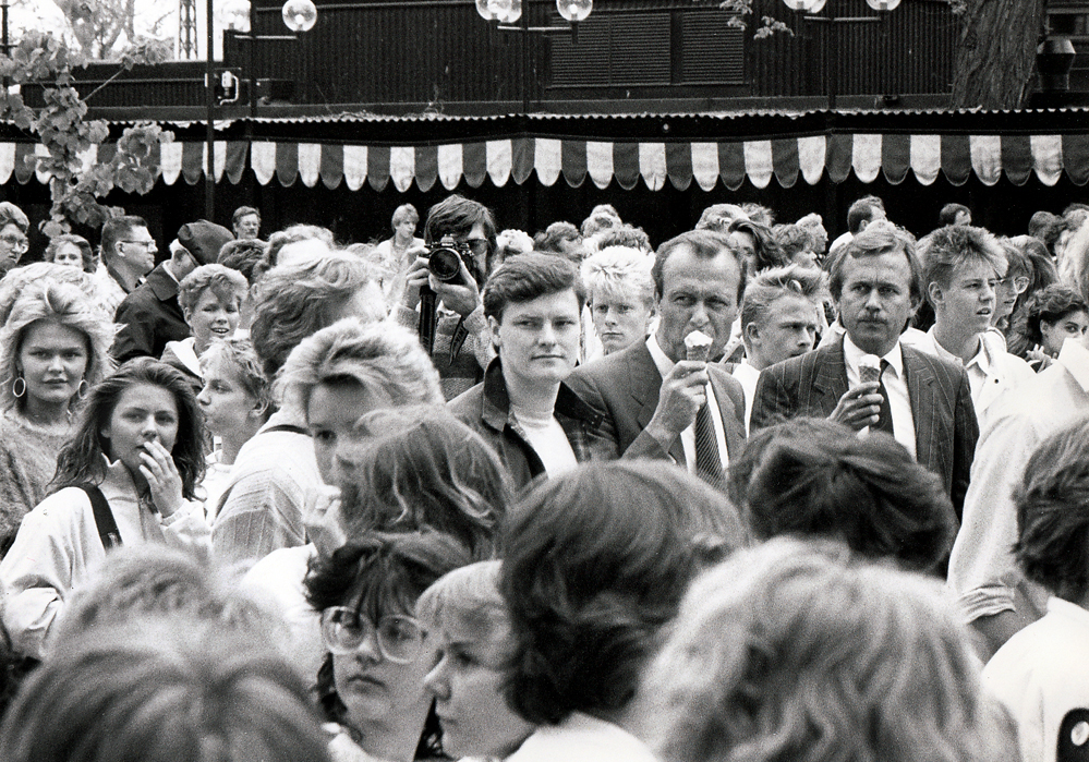 Under några dagar i Juni 1985 var det stökigt med hundratals "strejkande" skolelever på Gustav Adolfs Torg i Malmö. SÄPO hade två man på plats som diskret följde utvecklingen.